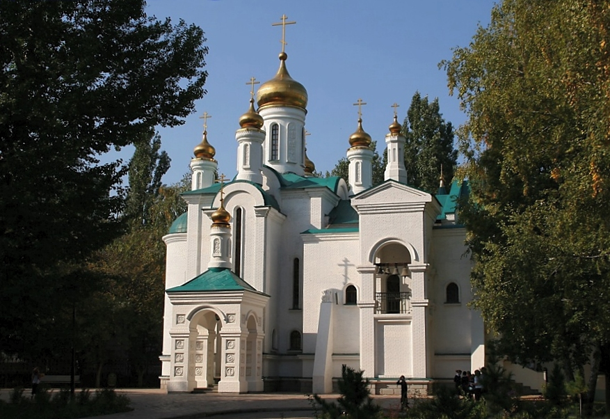 Храм во имя Всех Святых в земле Российской просиявших - домовая церковь Православной классической гимназии, Тольятти, Россия